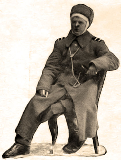 Albert Penttilä Suomen sisällissodan aikana.